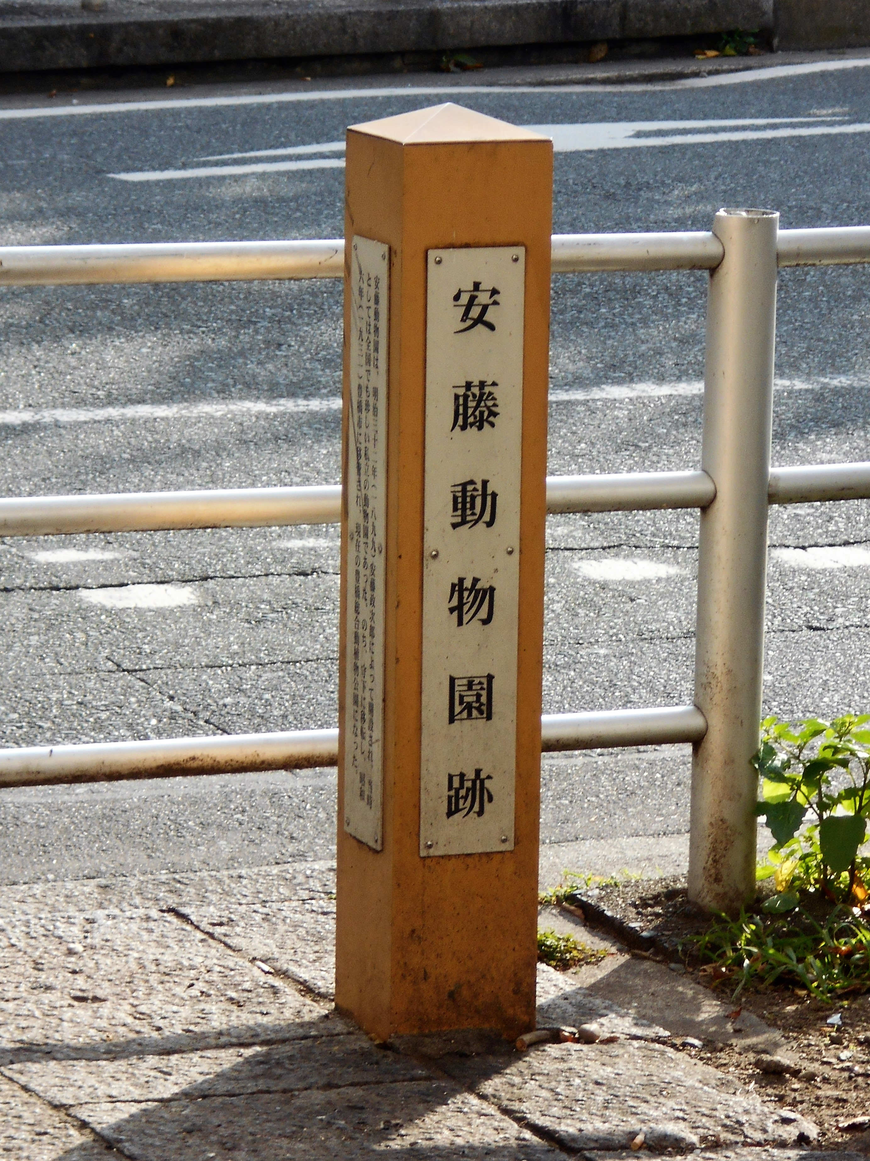 安藤動物園跡（豊橋駅前、2017年11月）